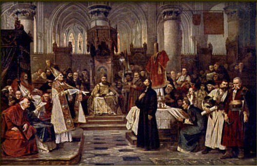 Česky: Václav Brožík (1851-1901) - Hus před koncilem 6. července 1415